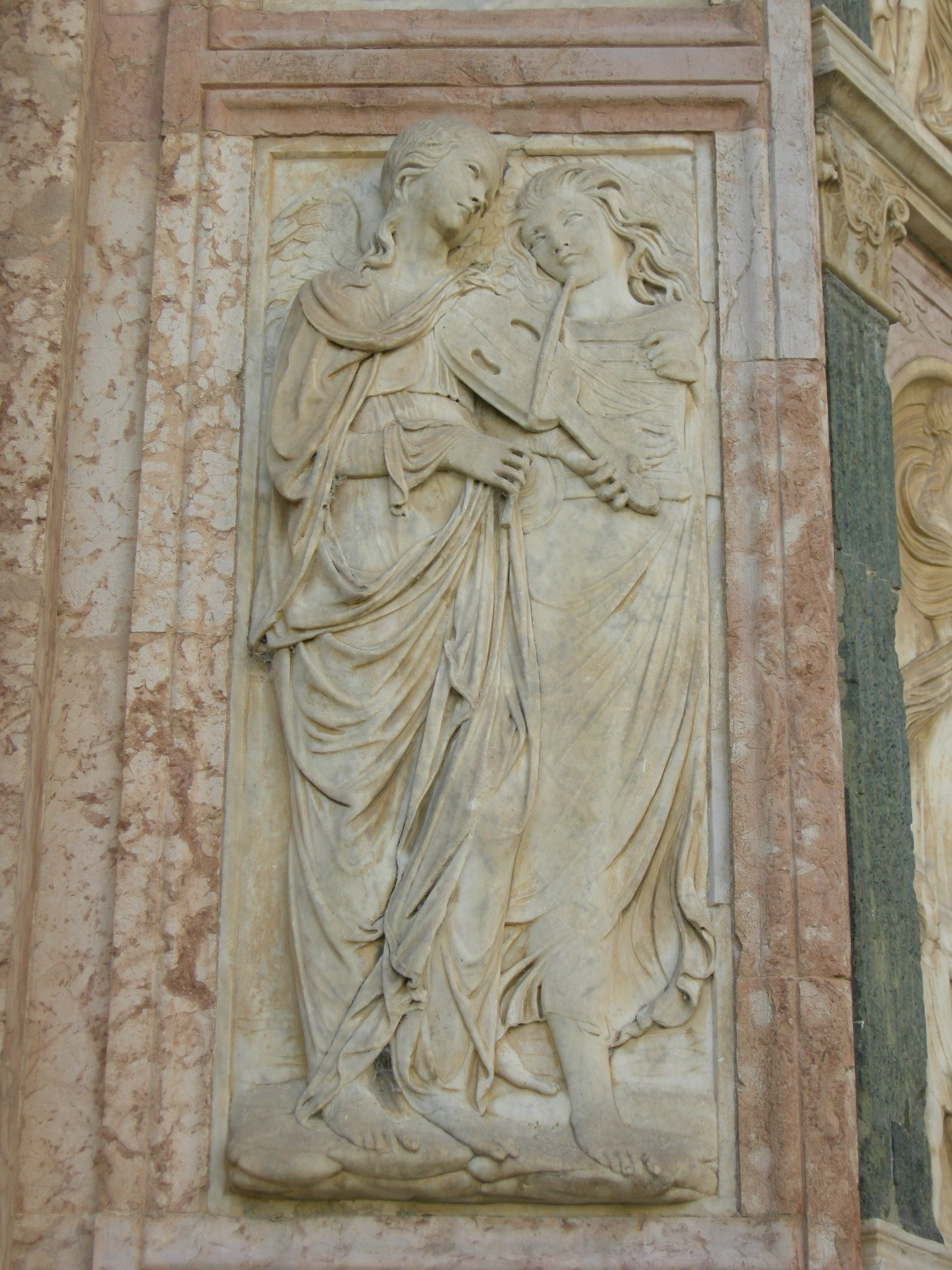 Perugia, oratorio di san bernardino, rilievi facciata di agostino di duccio